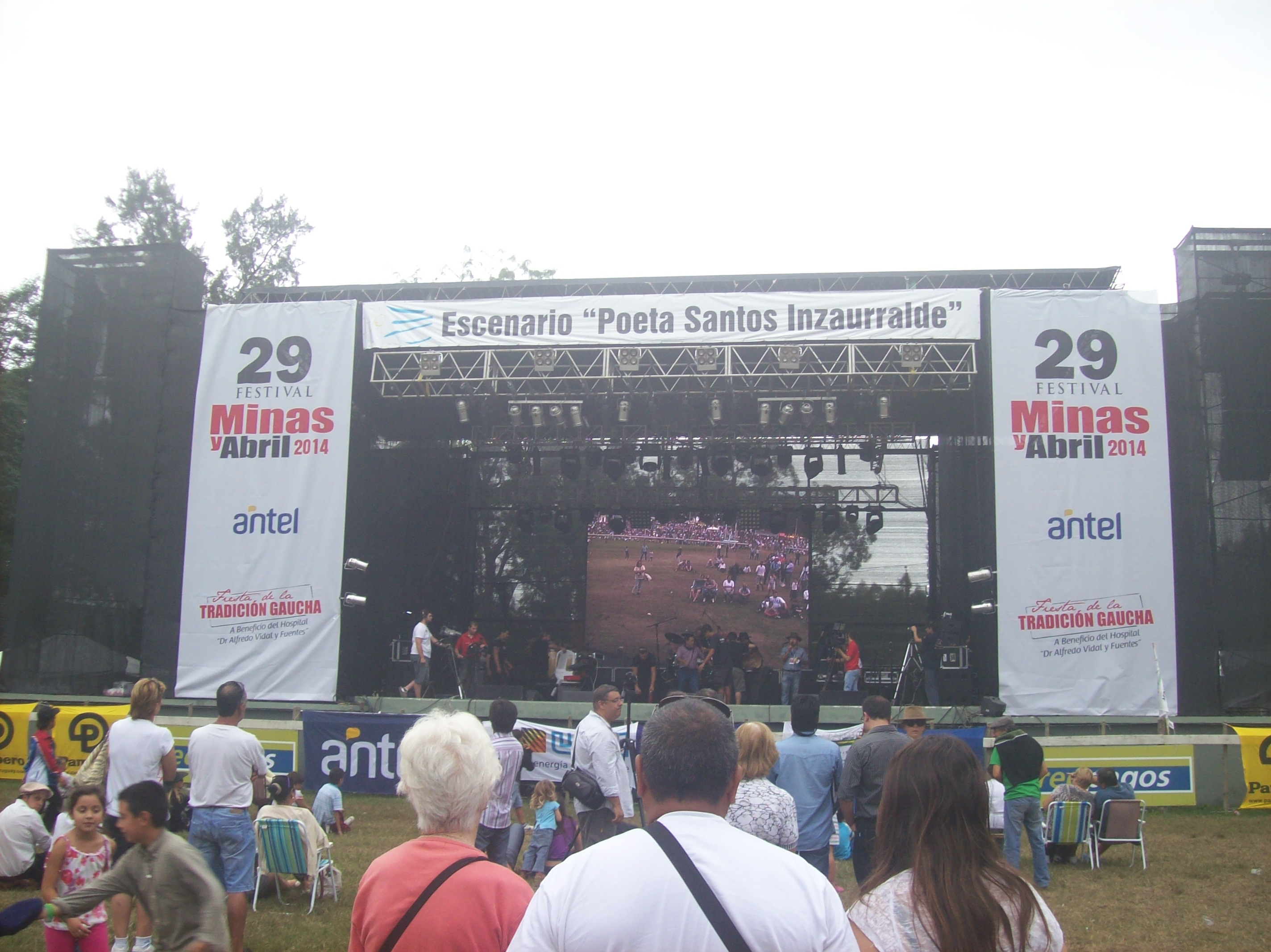 29º Festival Minas y Abril